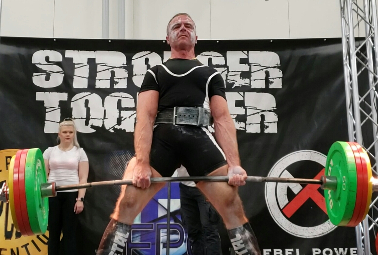 Mikko Mäntymäki Deadlift 260 kg Helsinki 2019